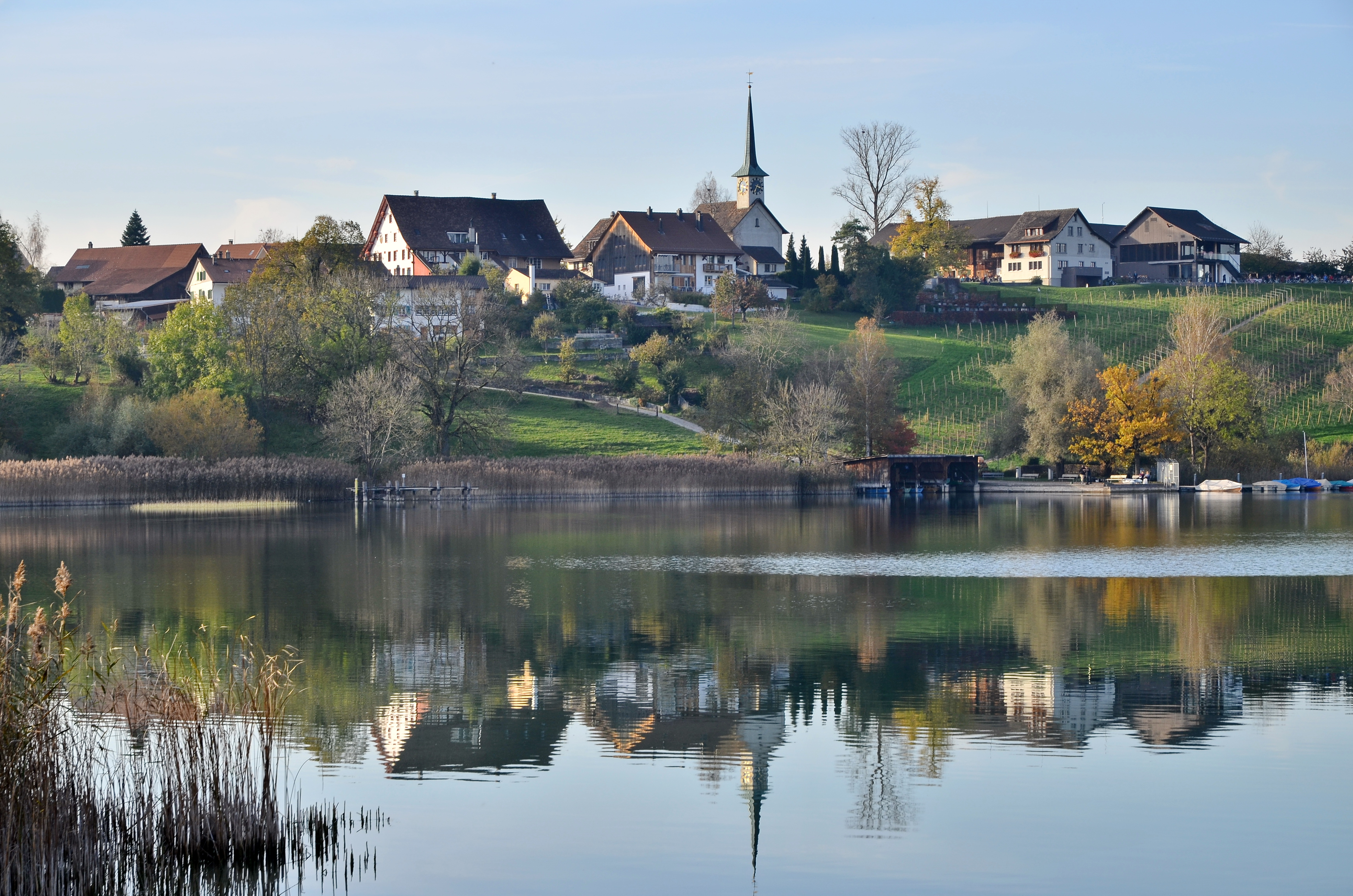 Ustermer Aa at Robenhausen (Robenhuserriet) in Wetzikon (Switzerland), Seegräben in the background.